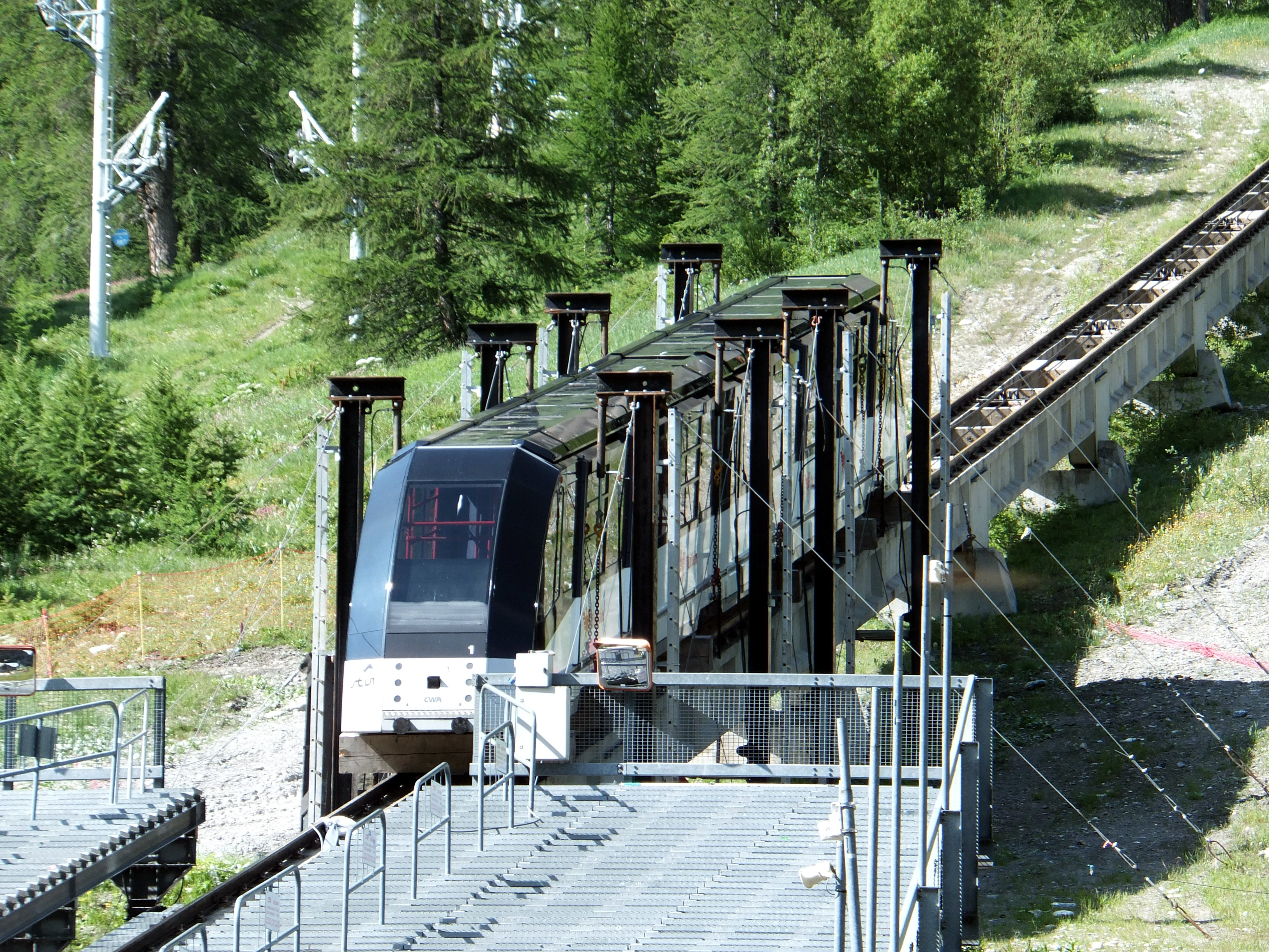 Cabine du Funival conçue par CWA.